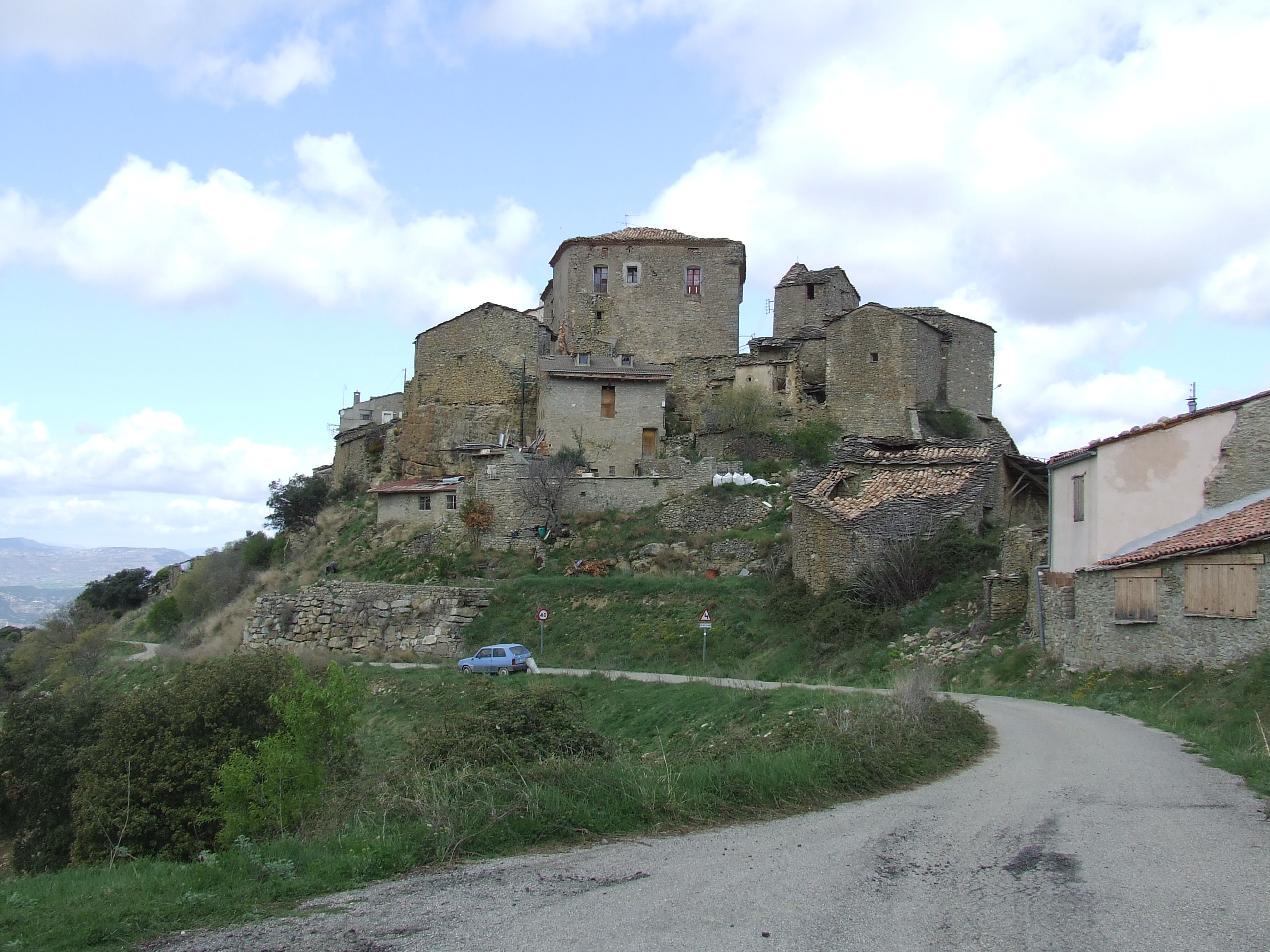 Castell-palau dels barons de Castellnou de Montsec. Vista general (Sant Esteve de la Sarga, Pallars Jussà)